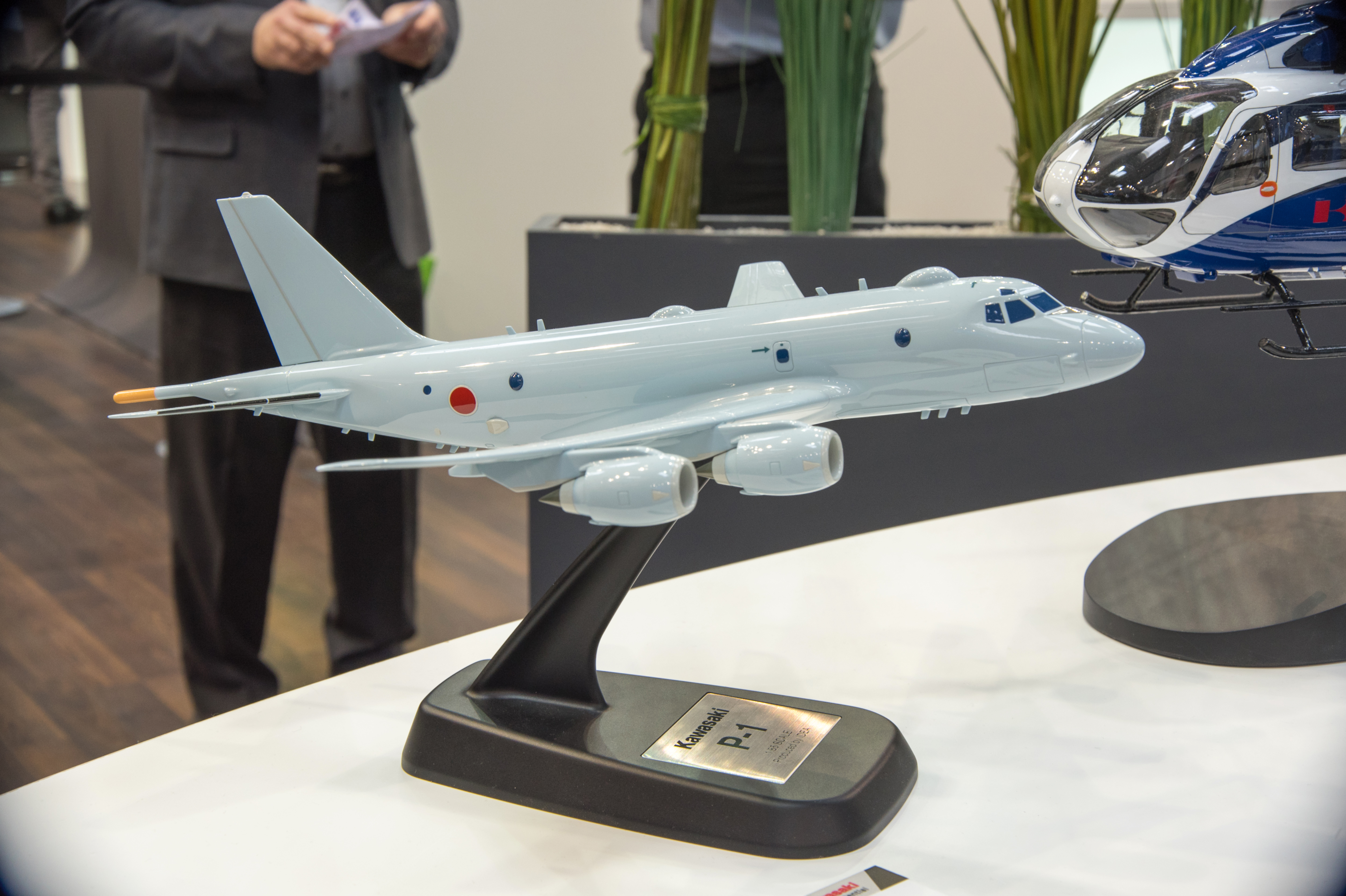 Kawasaki P-1 auf der Hannover-Messe 2017